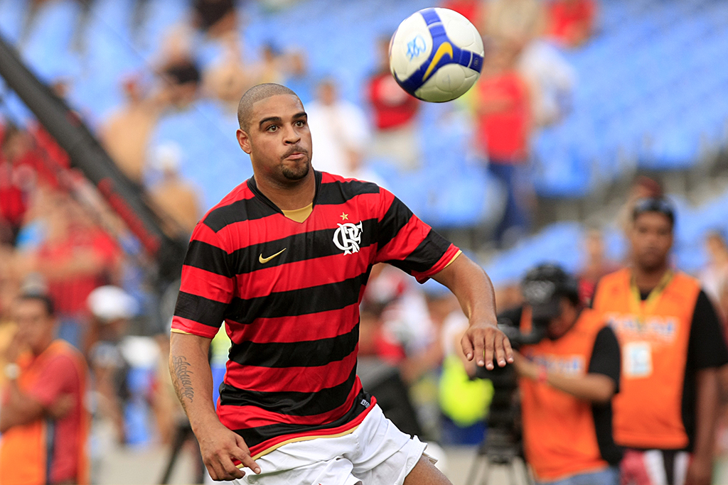 Enquanto todos olhavam para ele ele só tinha olhos para a bola. Retorno ao futebol carioca.